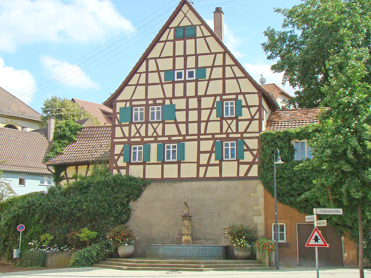 Denkmalgeschütztes Anwesen Unterlandstr. 2 in Heilbronn-Biberach